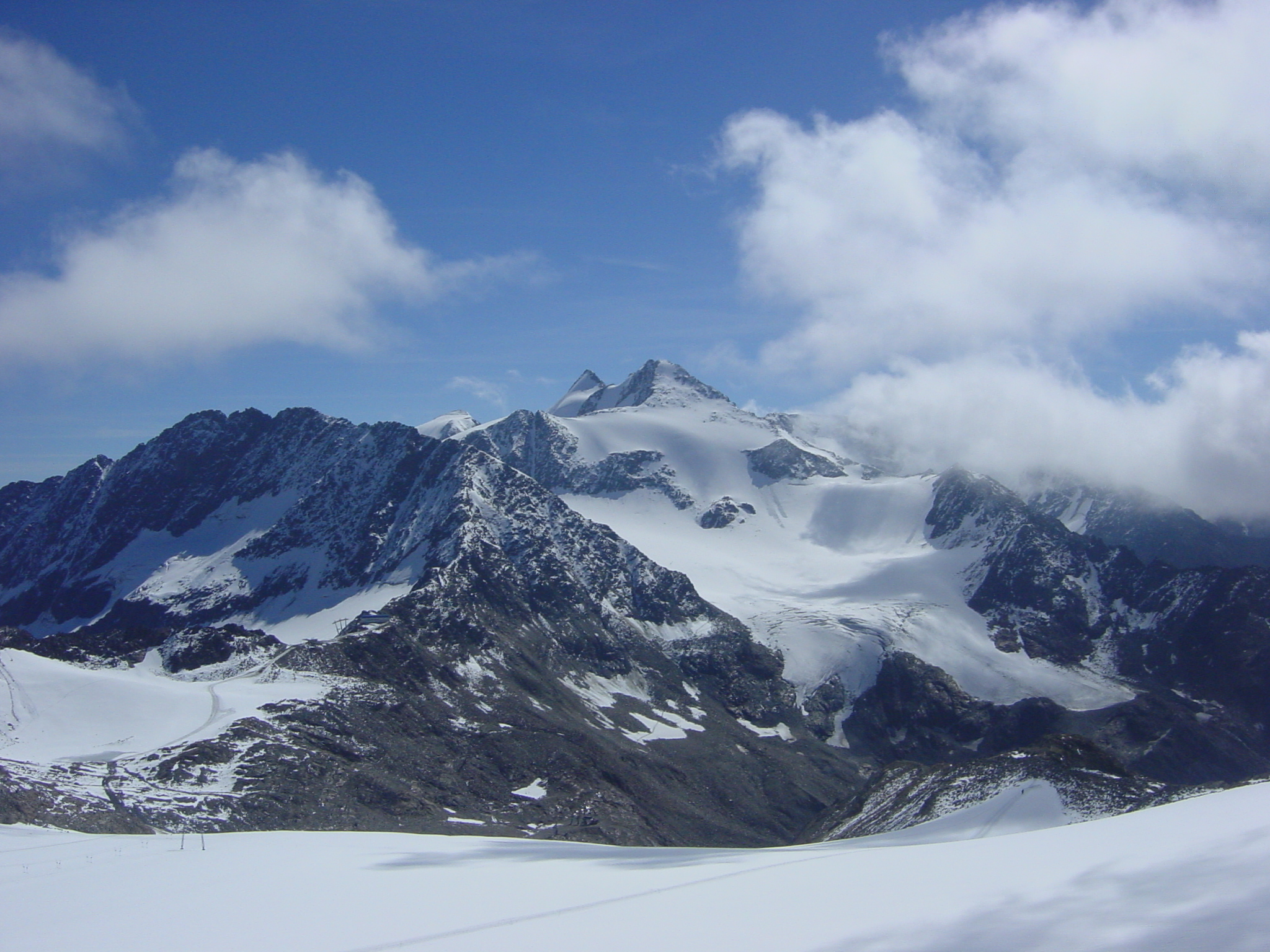 view from Jochdohle (3000m) on the Stubaier Gletscher to the Zuckerhütl